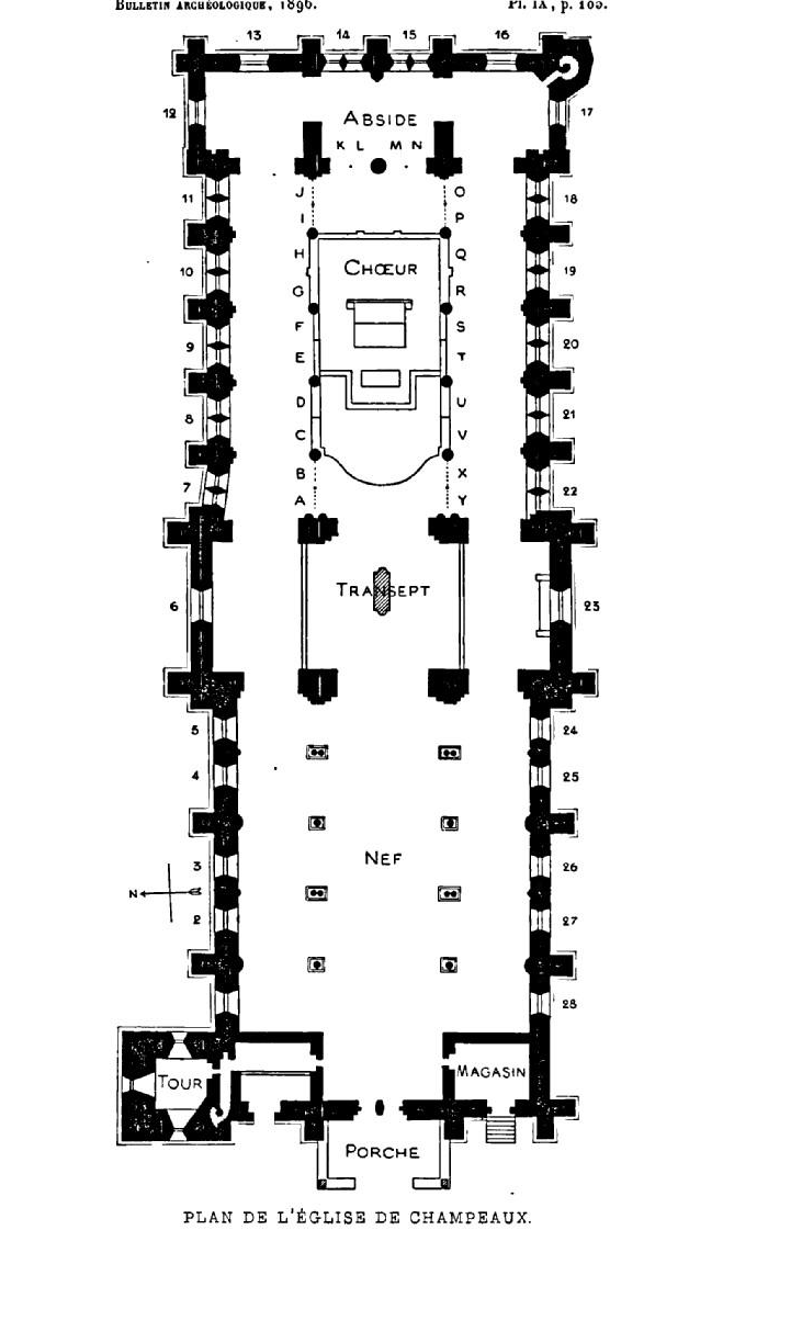 Plan de la collégiale, avec la position des vitraux.